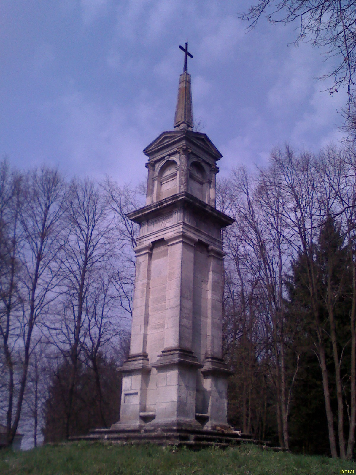 Родинне-фамільне поховання-склеп. Розташованне на схід від центру Комарно ,при дорозі на село Кліцько ,майстерно виконаний білокам*яний монумент у формі обеліска, стоїть на чотиригранному постаменті, сягаючи 13 метрів . На західному боці монумента вирізблено дати "1641" та "1663," а також магічний напис латиною по периметру постамента, по слову на кожній з чотирьох граней "MEA MORS TVA VITA "(Моя смерть-твоє життя).Розміщений таким чином напис можна читати на різні способи, міняючи при цьому зміст сентенції.